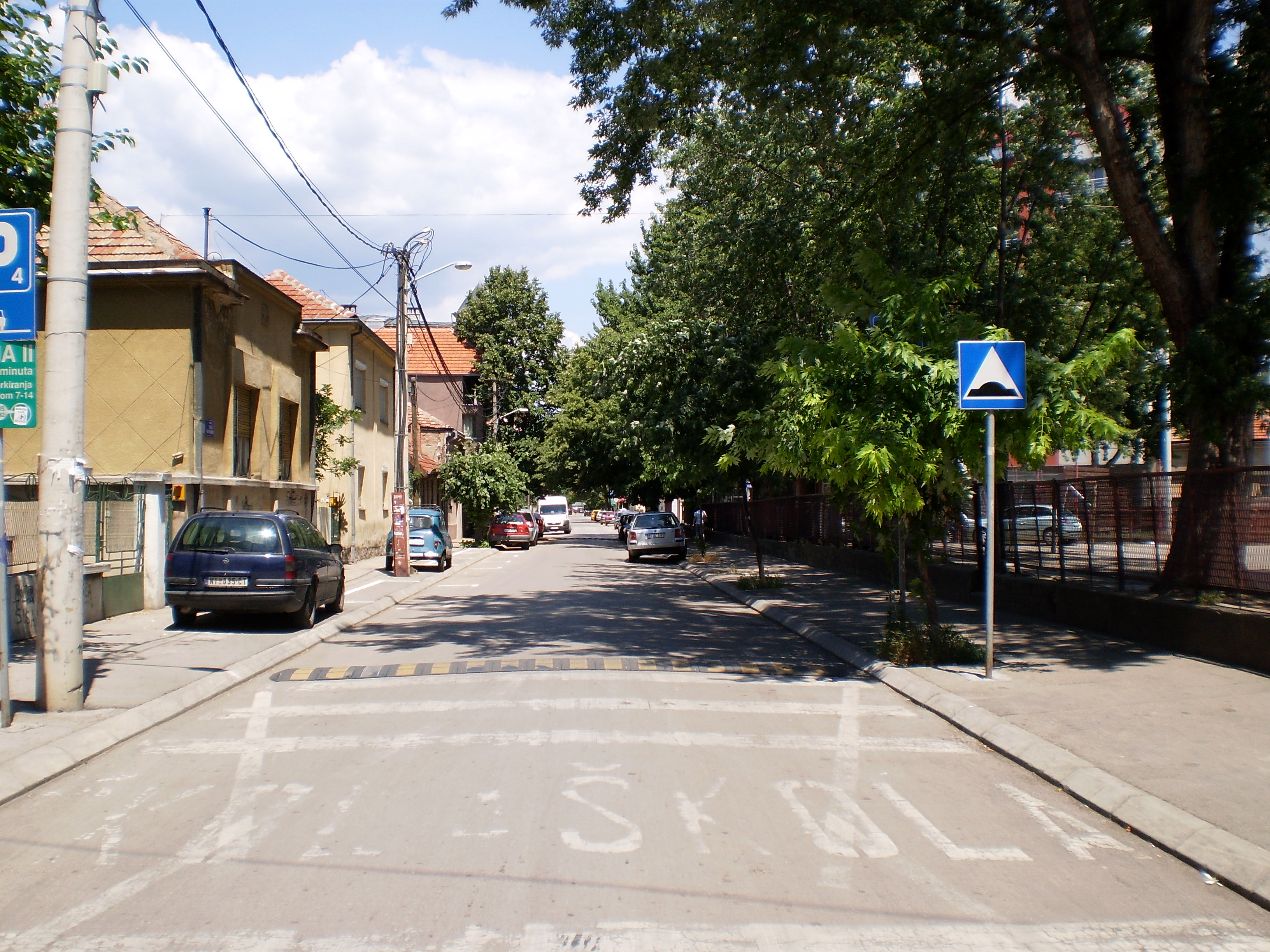 Ulica Todora Milovanovića u Nišu. Autor dr Milorad Dimić, Niš, Srbija. 27. jun 2012.